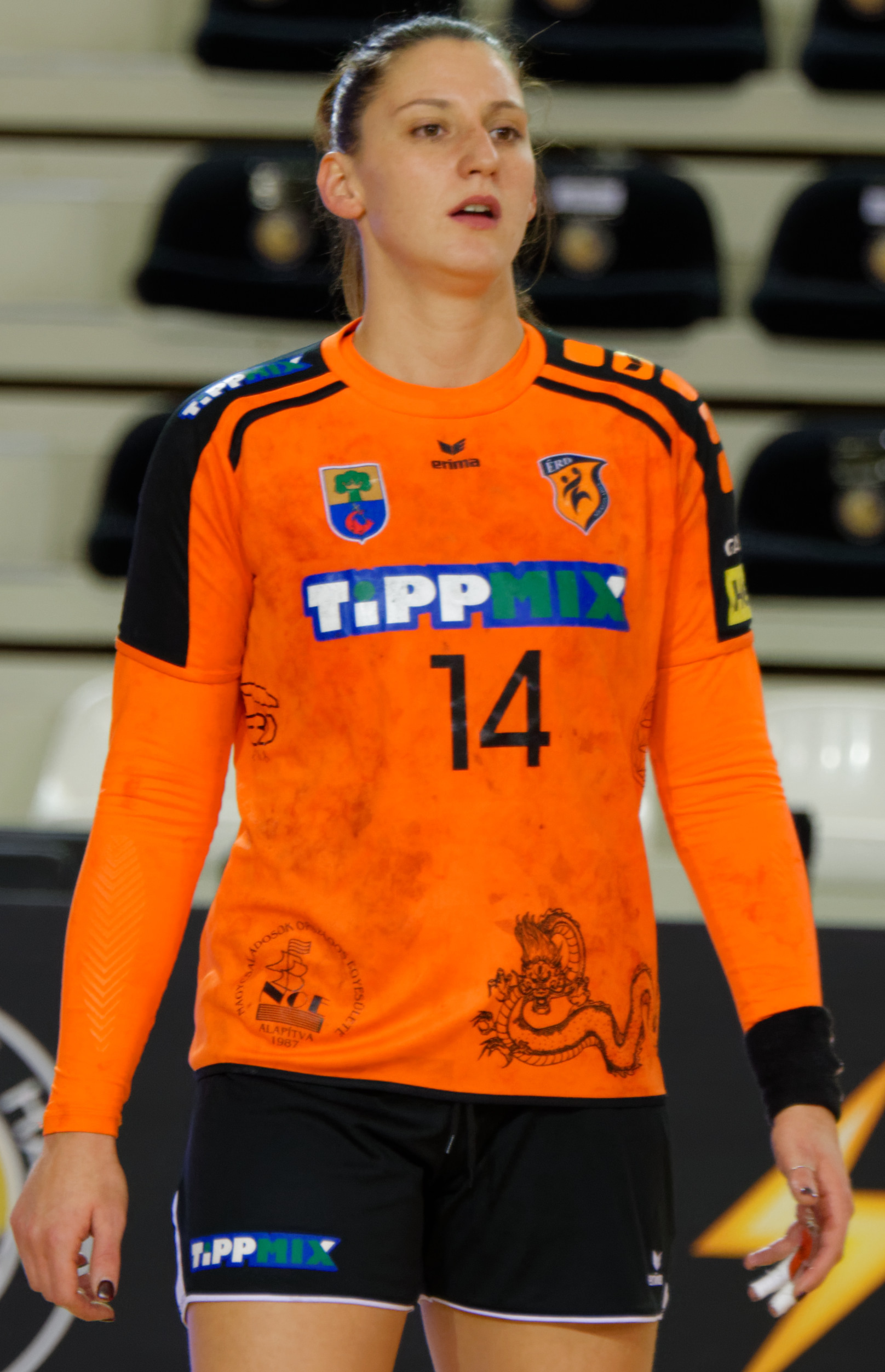 Rencontre retour du 3e tour de la coupe EHF, Issy Paris Hand / Erd. A Issy Les Moulineaux, le 18 novembre 2017.